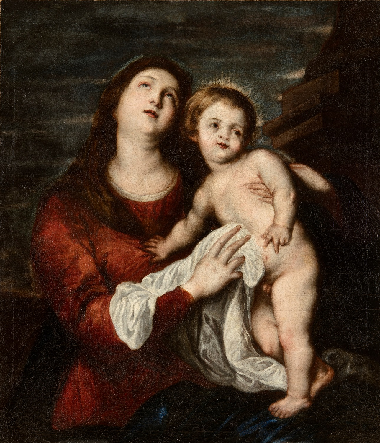 La obra representa a la Virgen María llevando en brazos a su hijo, el Niño Jesús.